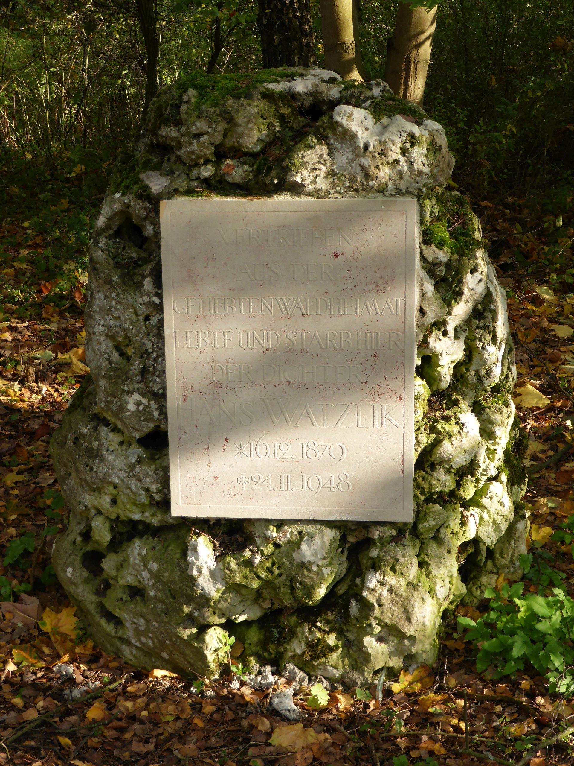 Watzlik-Kapelle (Pettendorf)